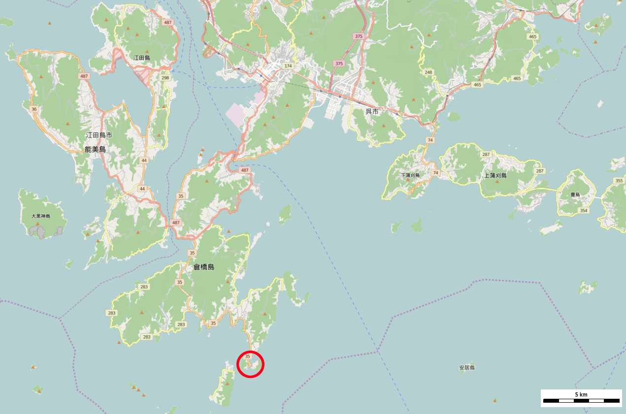 2015年広島県呉市倉橋町鹿老渡 This map may be incomplete, and may contain errors. Don't rely solely on it for navigation.